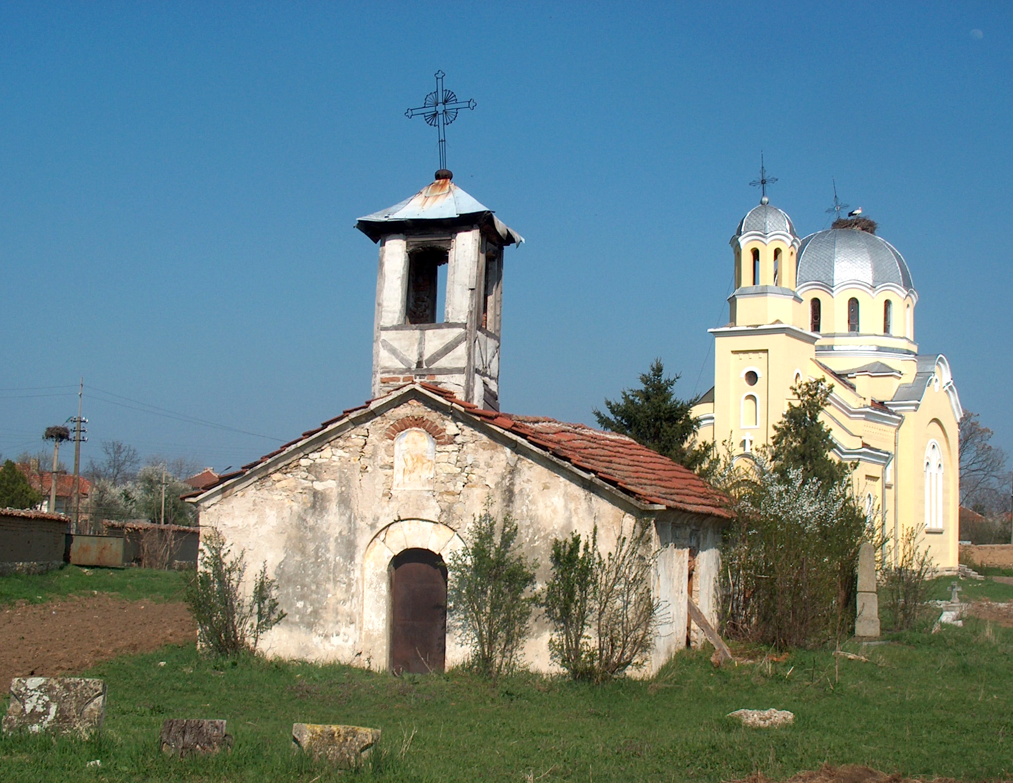 православни храмове "Св.Николай Чудотворец" в с. Владимирово, обл. Монтана